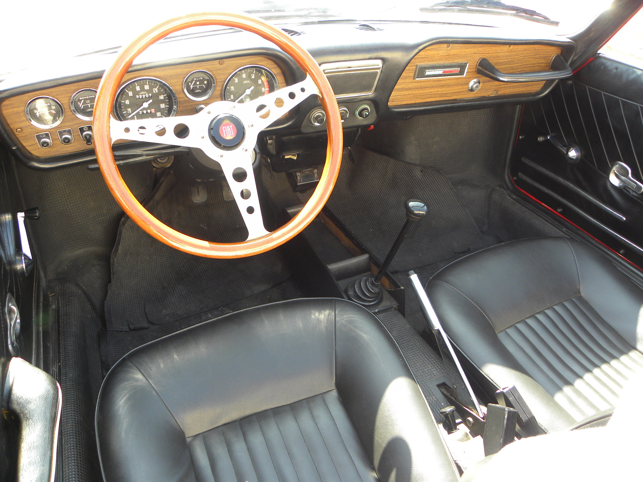 foto di interni originali su fiat 850 spider prima serie 1965